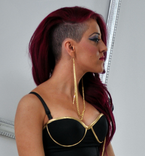 Australian Artist Giulietta (singer)